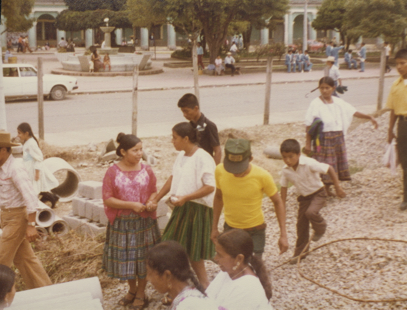 Coban, Guatemala.